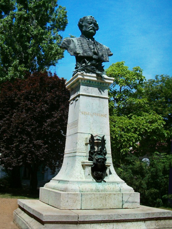 Erkel Ferenc szobra, Gyula; saját kép, 2005.; Váradi Zsolt 2005. június 9., 09:30 (CEST)